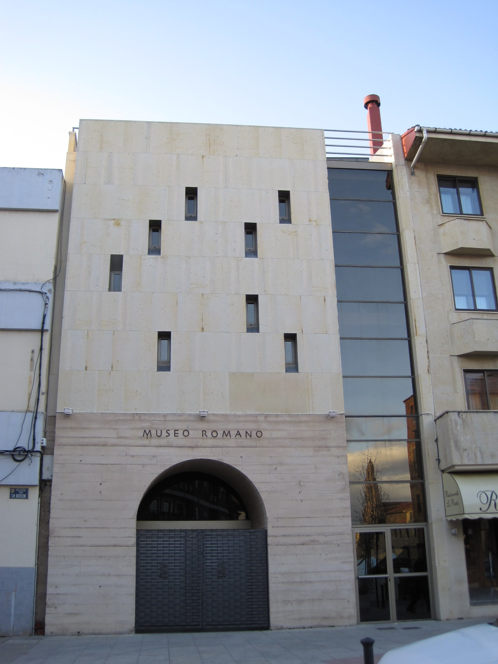 Fachada del Museo Romano de Astorga (provincia de León, España).